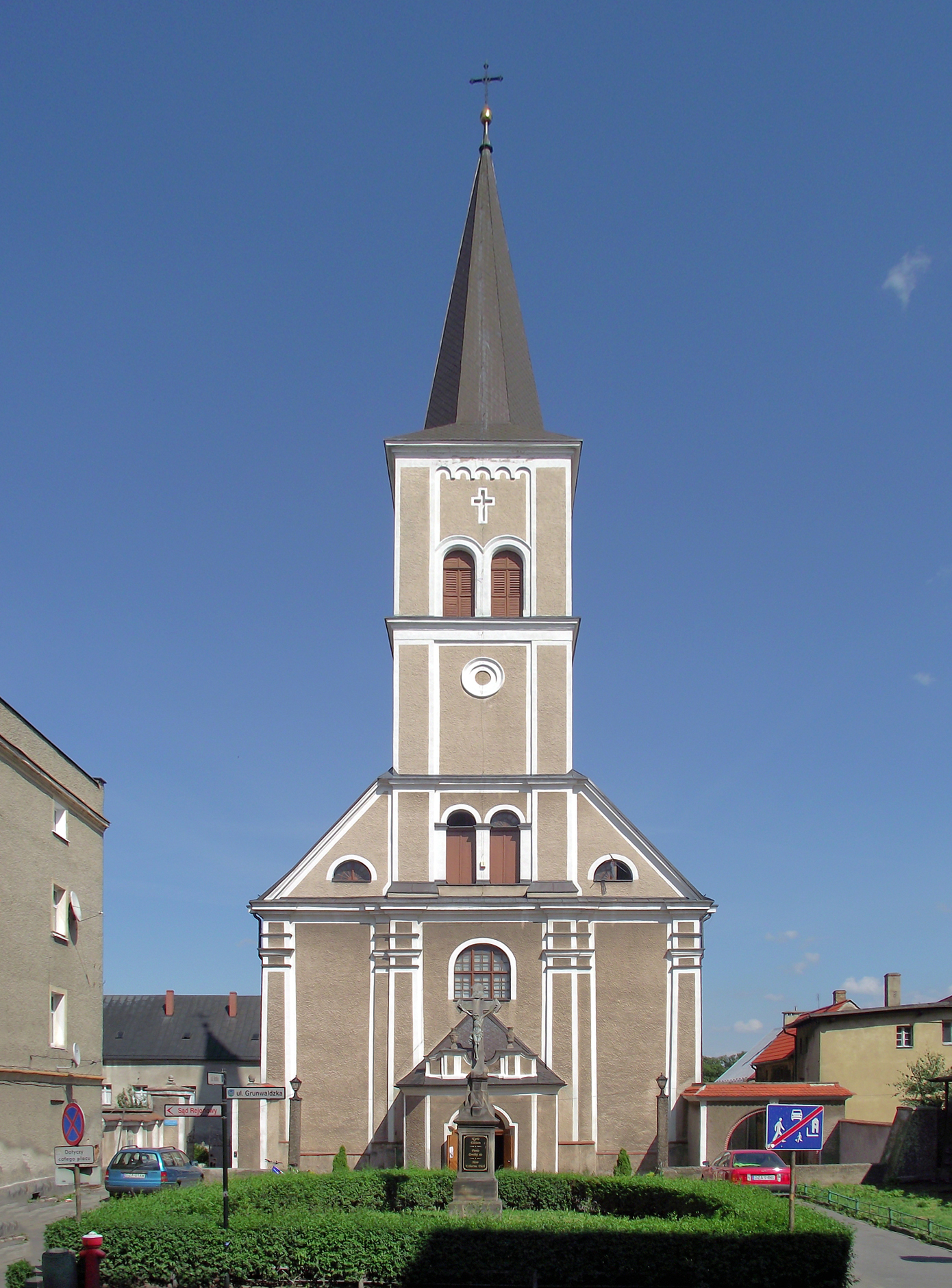 Ząbkowice Śl., ul. Grunwaldzka 8 - kościół p.w. Podwyższenia Krzyża w zespole klasztornym dominikanów z XIV-XVIII w. (zabytek nr A/1725/730)